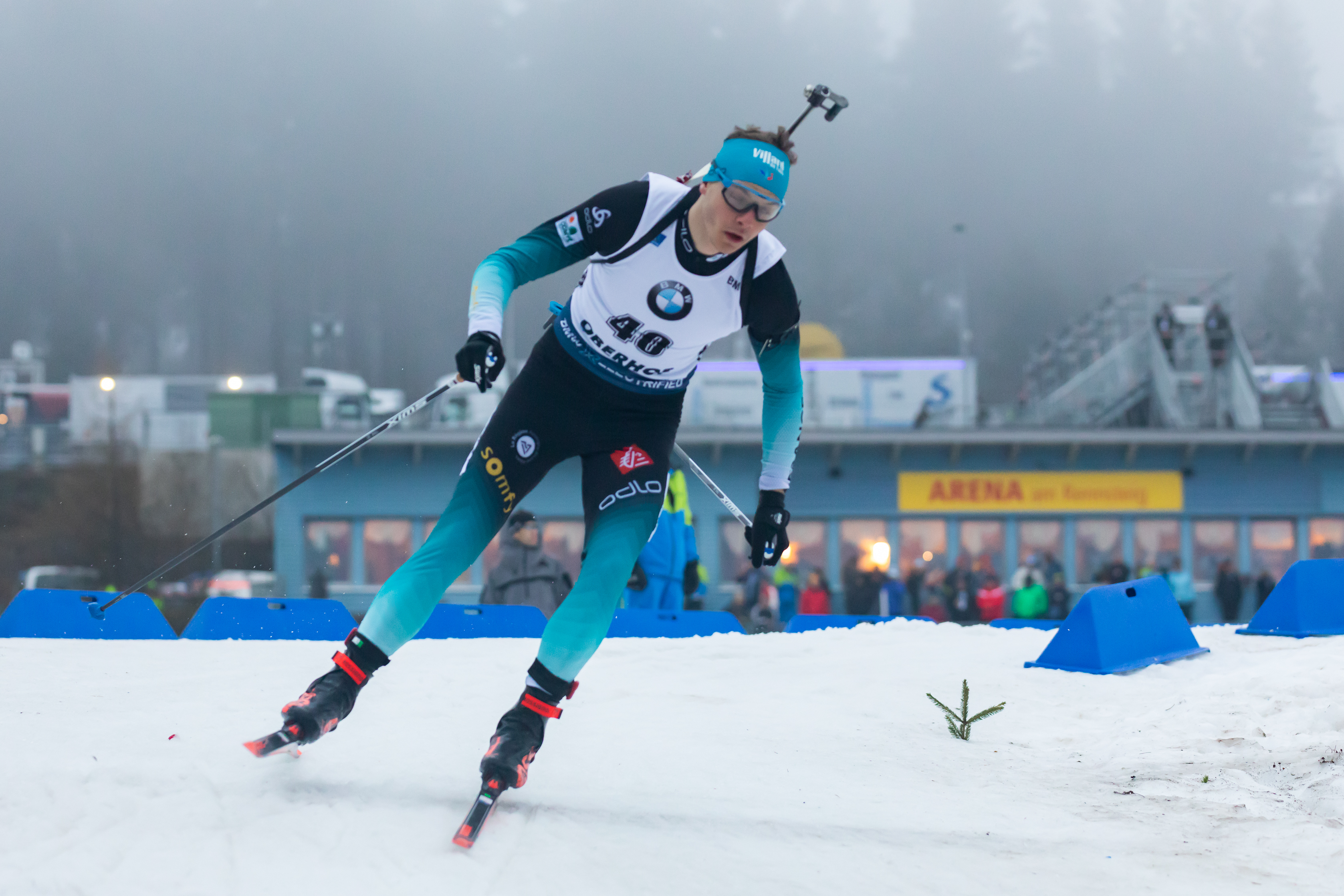 IBU World Cup Biathlon Oberhof; Emilien Jacquelin (FRA, Frankreich)